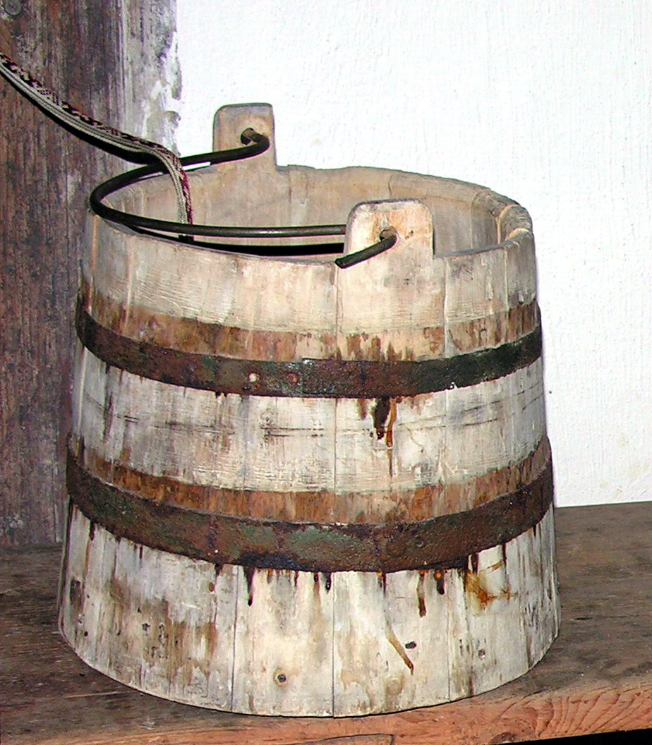 Medinis kibiras 2007-04-21, Lietuva